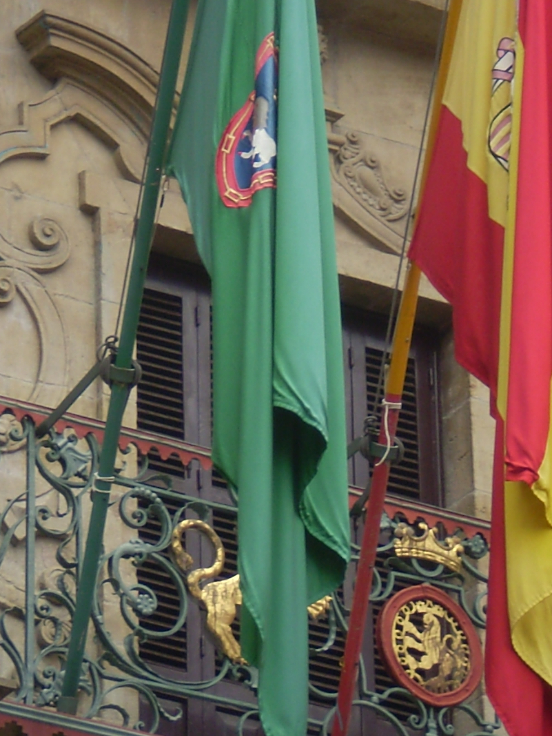 Bandera de Pamp`lona ondeando en el ayuntamiento